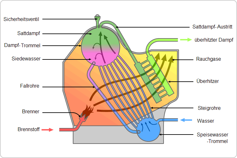 Wasserrohrkessel